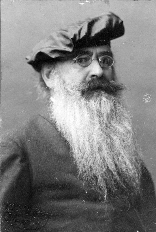 Scherl: Der bekannte Wiener Schriftsteller Guido von List, Aufnahme: Conrad H. Schiffer, Hoffotograph, Wiesbaden [Archivzugang: Dezember 1913] Abgebildete Personen: List, Guido von: Schriftsteller, Österreich Information added by Wikimedia users.According to the original description above, the photographer was Conrad Hubert Schiffer (d. 1942 according to HADIS), court photographer, Wiesbaden. Schiffer had taken over the studio of Carl Bornträger (b. 1826 in Königsberg, d. 1901-09-24 in Wiesbaden, according to HADIS) at Taunusstrasse 24 (p. 160 of the Rheingauer Adressbuch 1909-1911). For Schiffer, HADIS has photos from 1875 to 1915, Bornträger's studio was founded in 1864. According to [1], the image was published in 1910 in Guido List: Gesammelte Werke, Zweite Reihe: Forschungsergebnisse, 3. Band: Bilderschrift der Ariogermanen. Verlag der Guido-von-List-Gesellschaft, Wien 1910, and was taken on June 12, 1909.